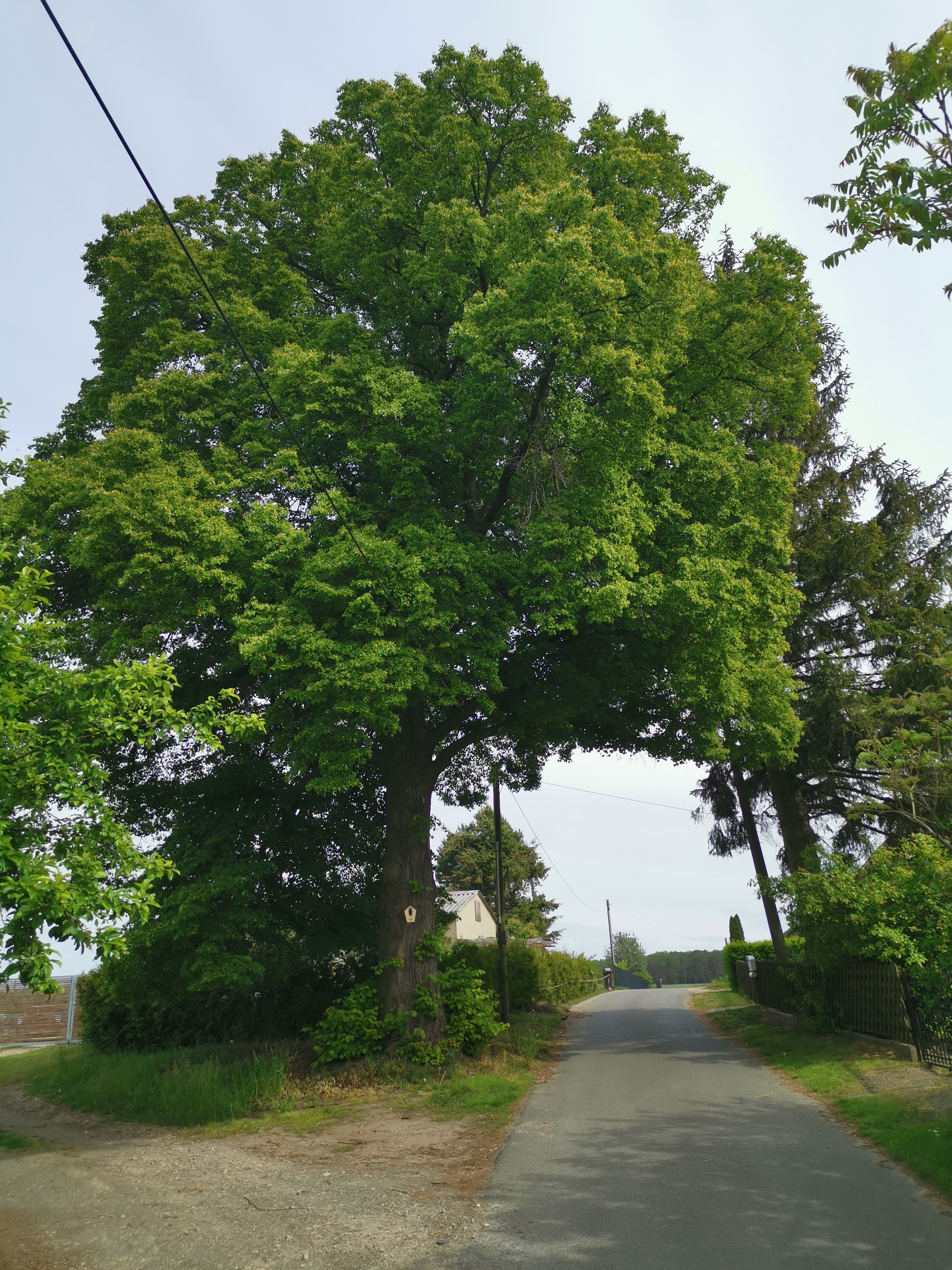 Naturdenkmal Linde in Groß Döbbern